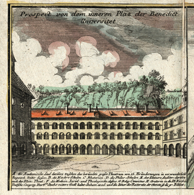 Salzburg, Benedict-Universitet from: Prospectus Elegantiores Splendidissimae Archiepiscopalis Urbis Salisburgensis praecipuarumque in ea Illustrium, ac maxime mirabilium, tam Sacrarum quam profanarum Aedium